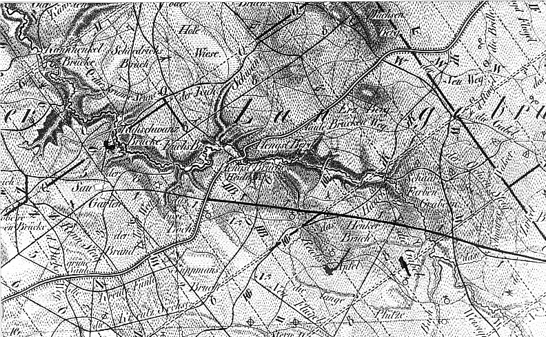 Original image description from the Deutsche Fotothek Dresden-Langebrück. Oberreit, Sect. Dresden, 1821/22